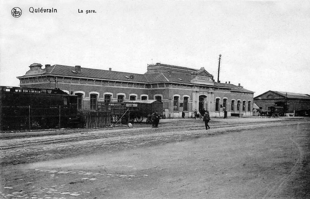 Place de la gare et bâtiment voyageurs de la gare frontière de Quiévrain vers 1900.